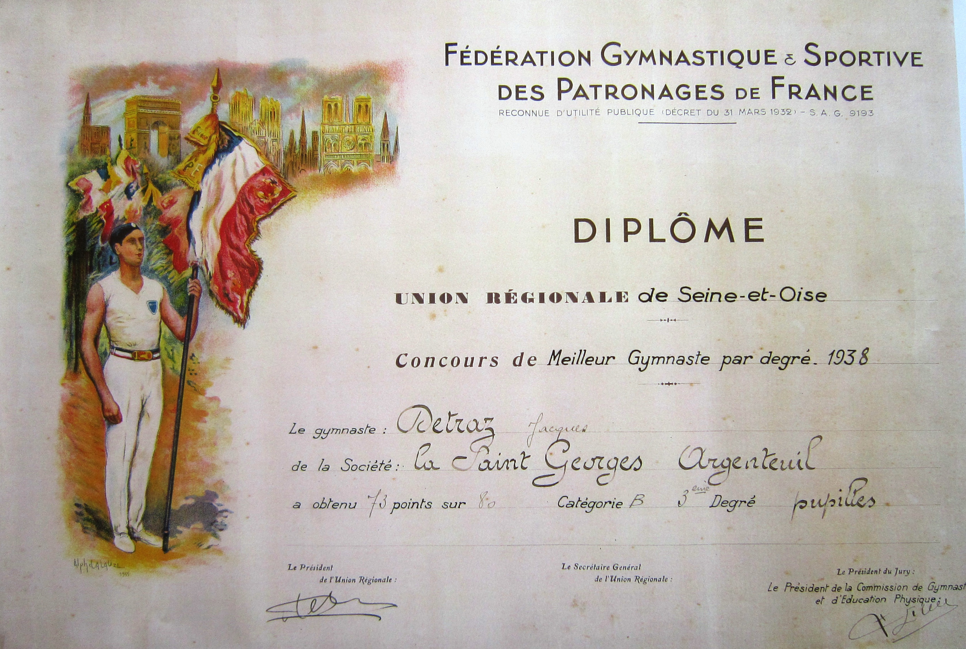 Ancien diplôme de classement sportif (Gymnastique)